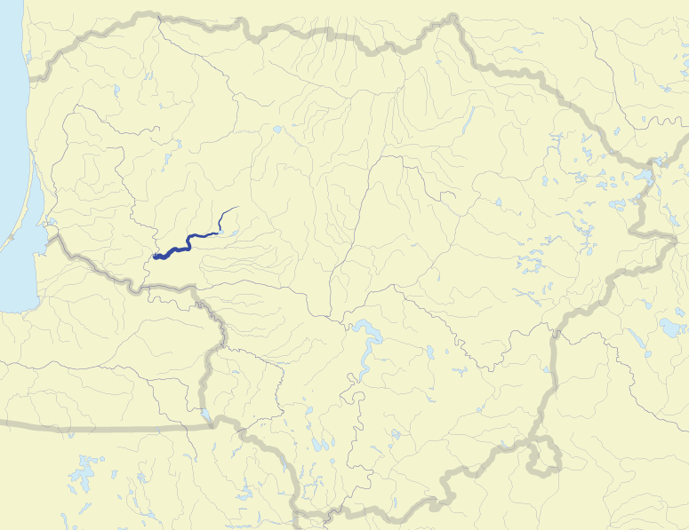 River Šešuvis